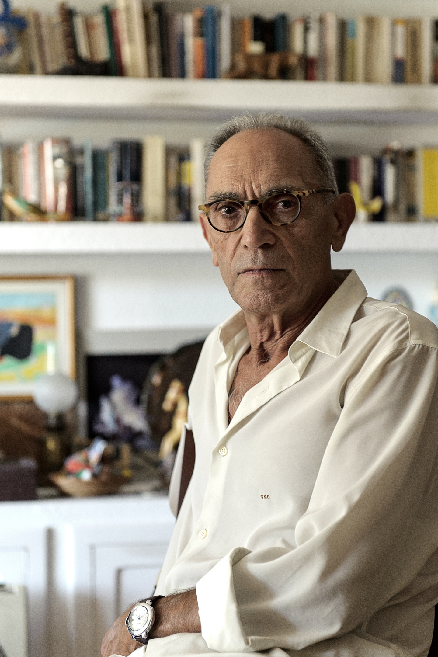 El autor German Sánchez Espeso, ganador del premio Nadal, en su casa, fotografiado por Javier Pérez Santos